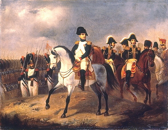 Ludwig Elsholtz, Napoleon I. mit seinen Generalen, Berlin 1845